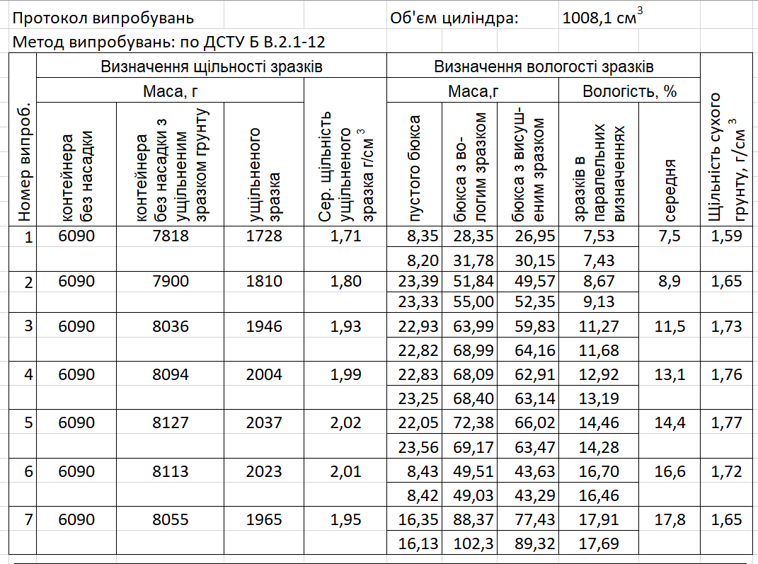 Слугує для побудови графіка, що визначає максимальну щільність сухого грунту